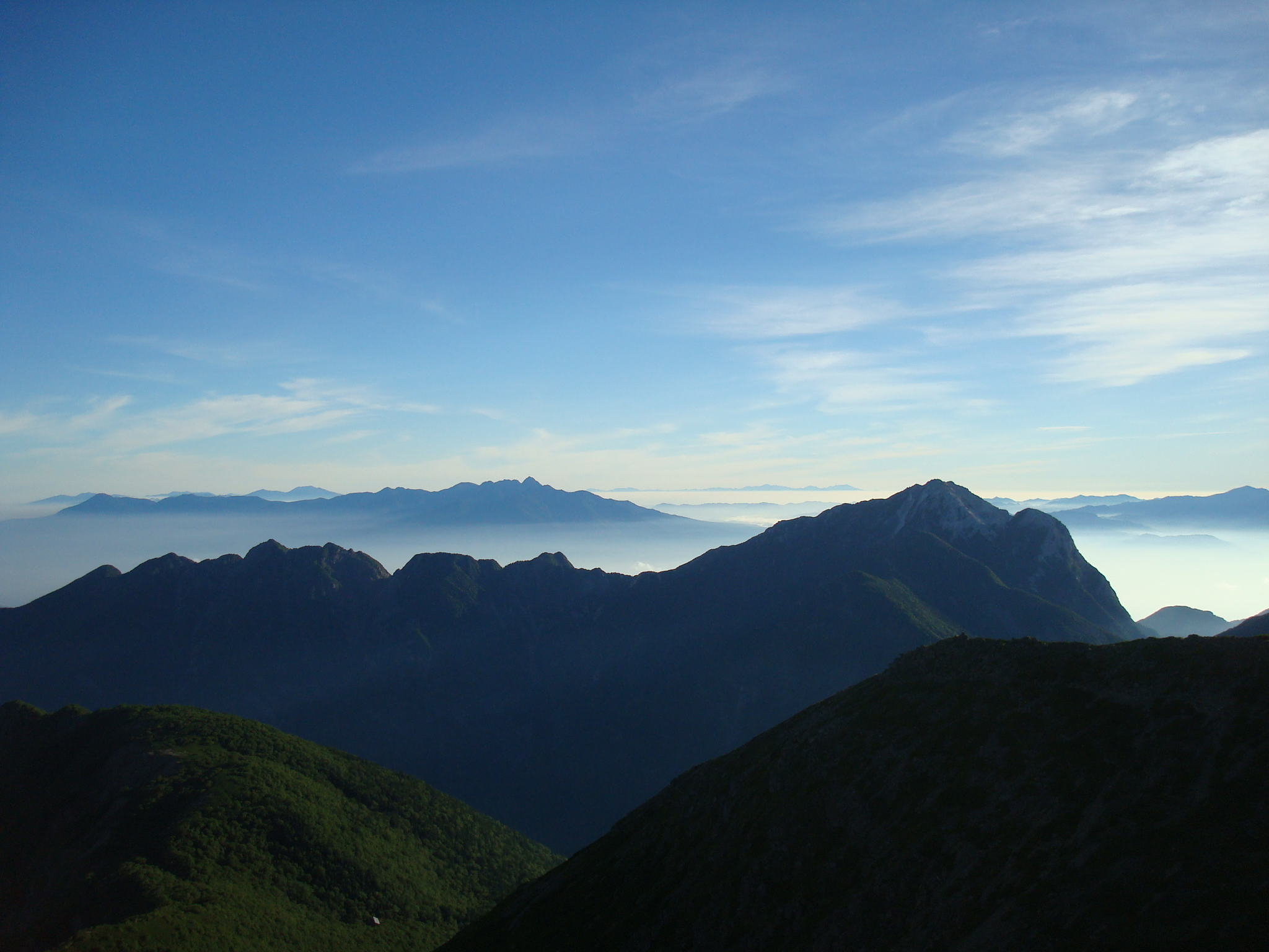 仙丈ヶ岳から甲斐駒ヶ岳を望む